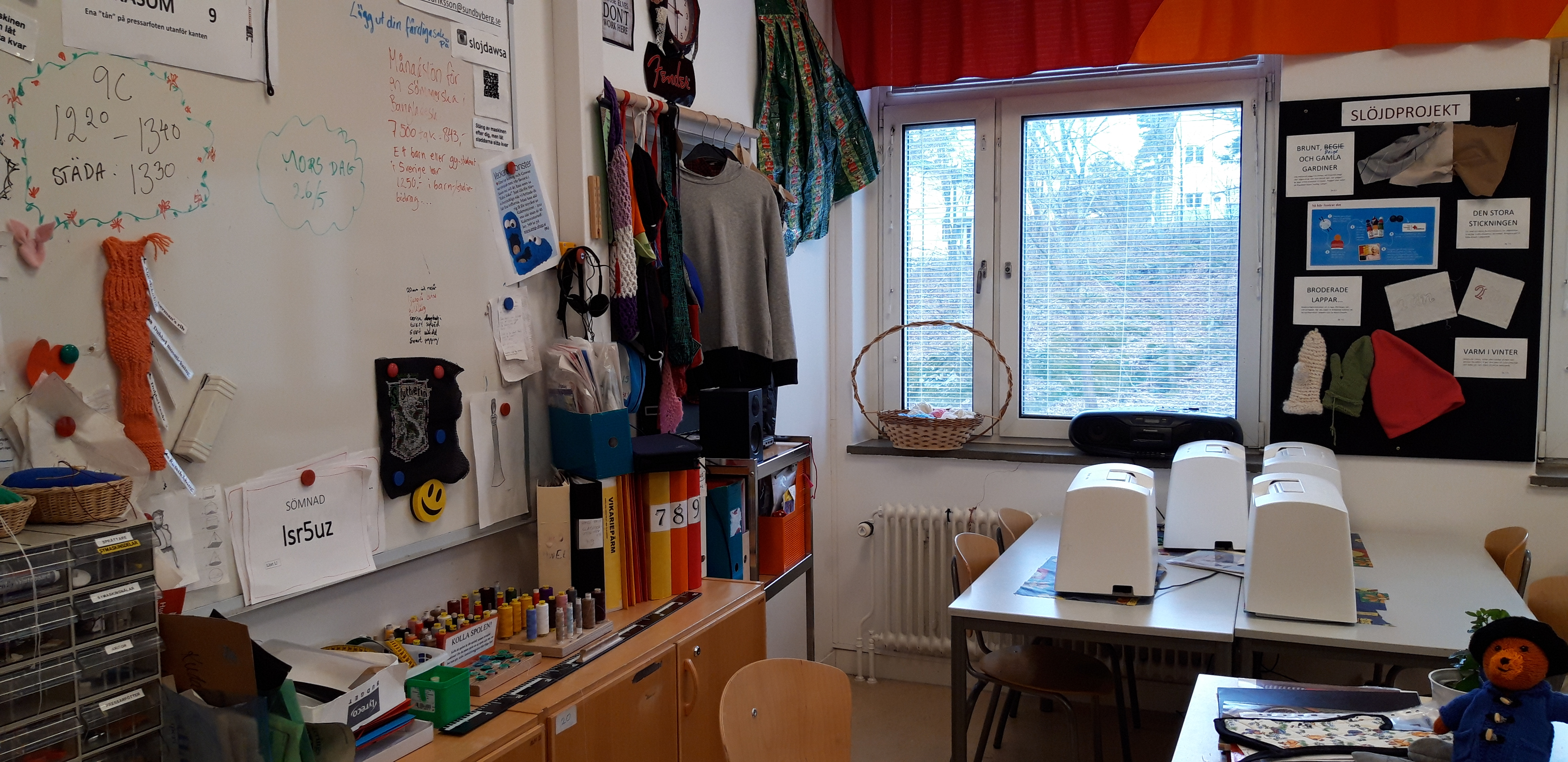 Escuela de Primaria y Secundaria en Sundbyberg, Estocolmo. Taller de costura